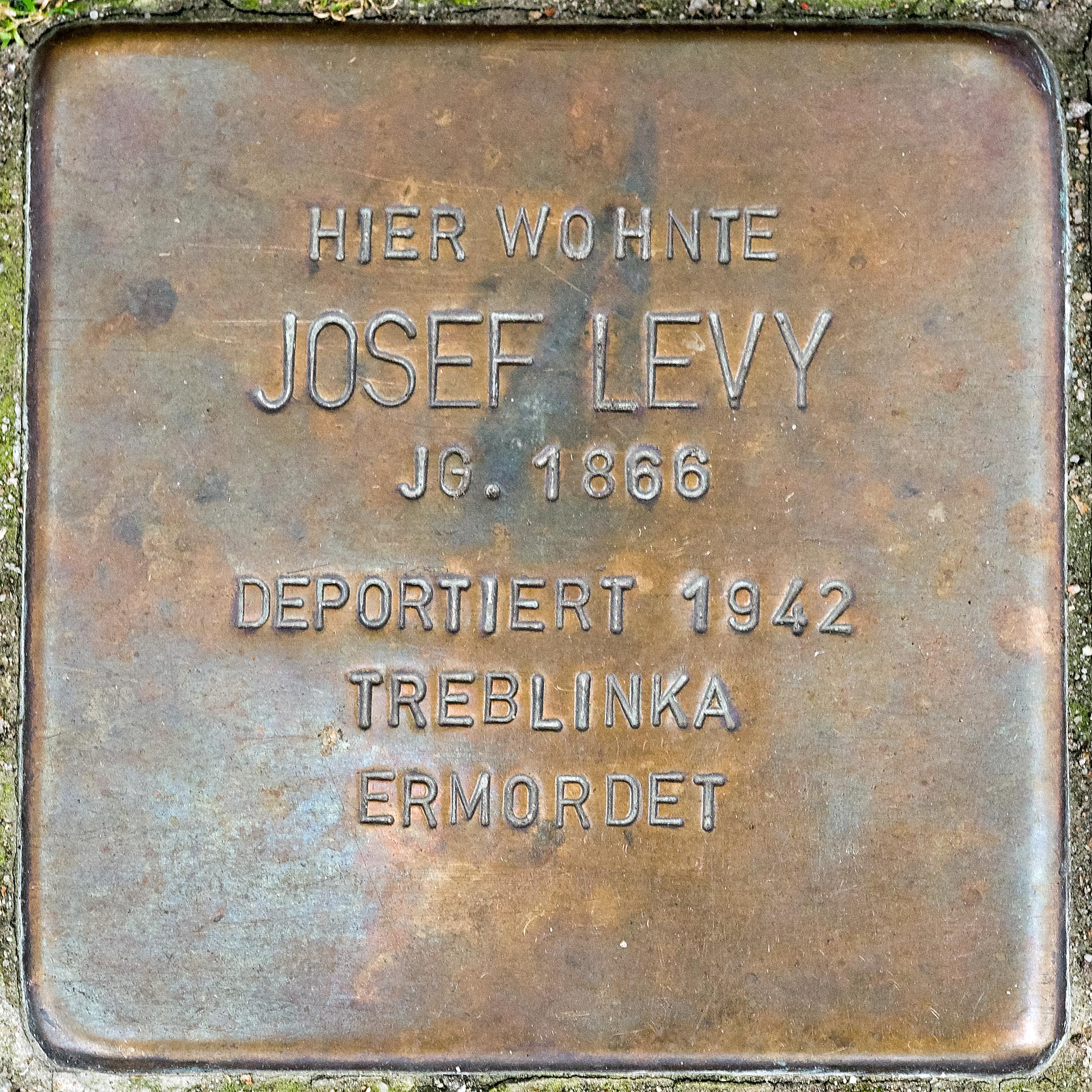 Stolperstein Levy, Josef